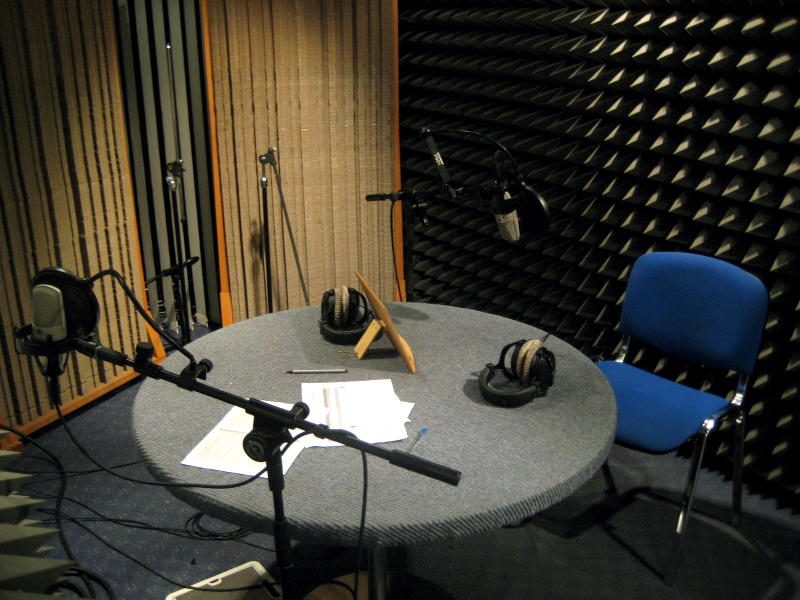 Radio Afera Poznań. Studio Produkcyjne (nagraniowe).